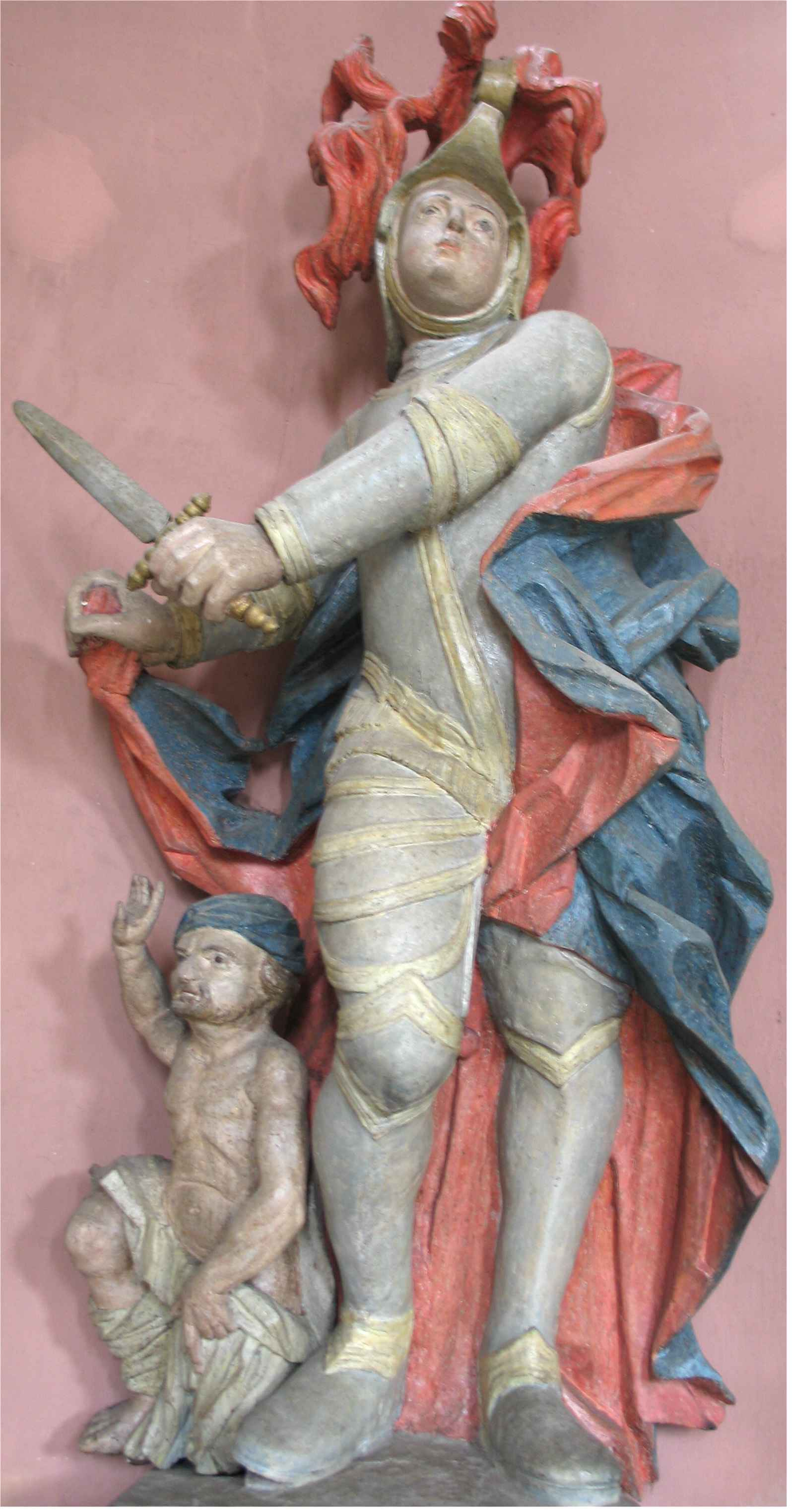 Statu vum Hl. Martin (an der Kierch vu Jonglënster). Jonglenster Kategorie:Gemeng Jonglënster